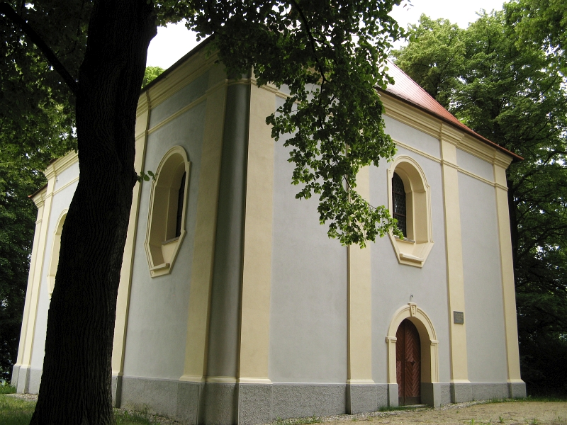 Kaple sv. Vavřince (Domažlice), na kopci Veselá Hora, 2, 5 km JZ od náměstí, Domažlice